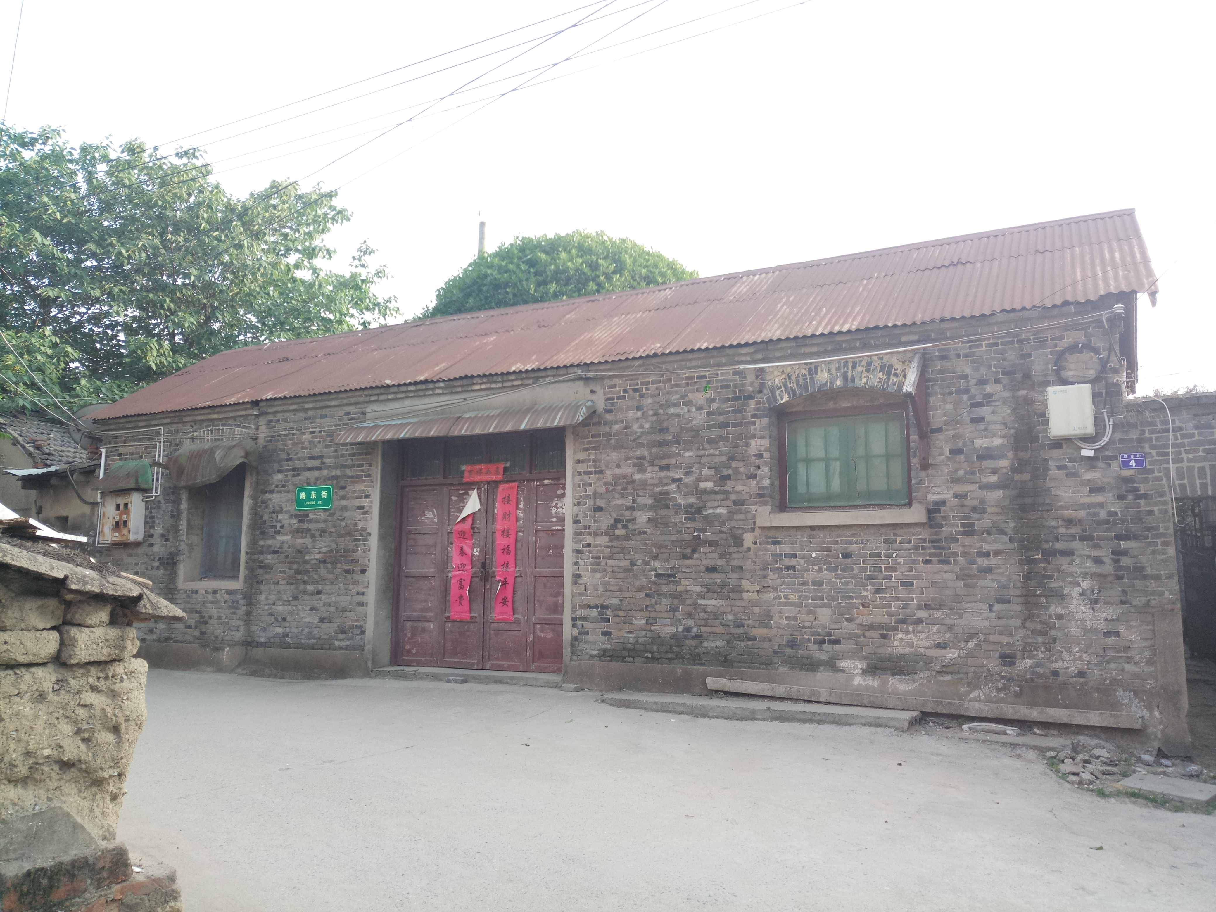 中文（中国大陆）: 【滁州文保专题】位于遵阳街的滁州站站房 据称该房系英国人所建，后被日本人占领